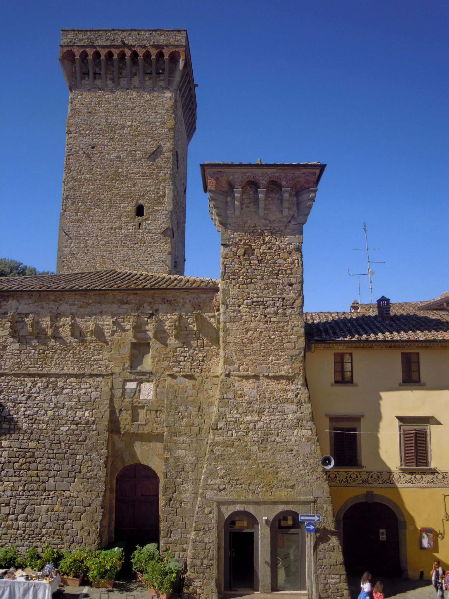 Centro storico This is a photo of a monument which is part of cultural heritage of Italy.